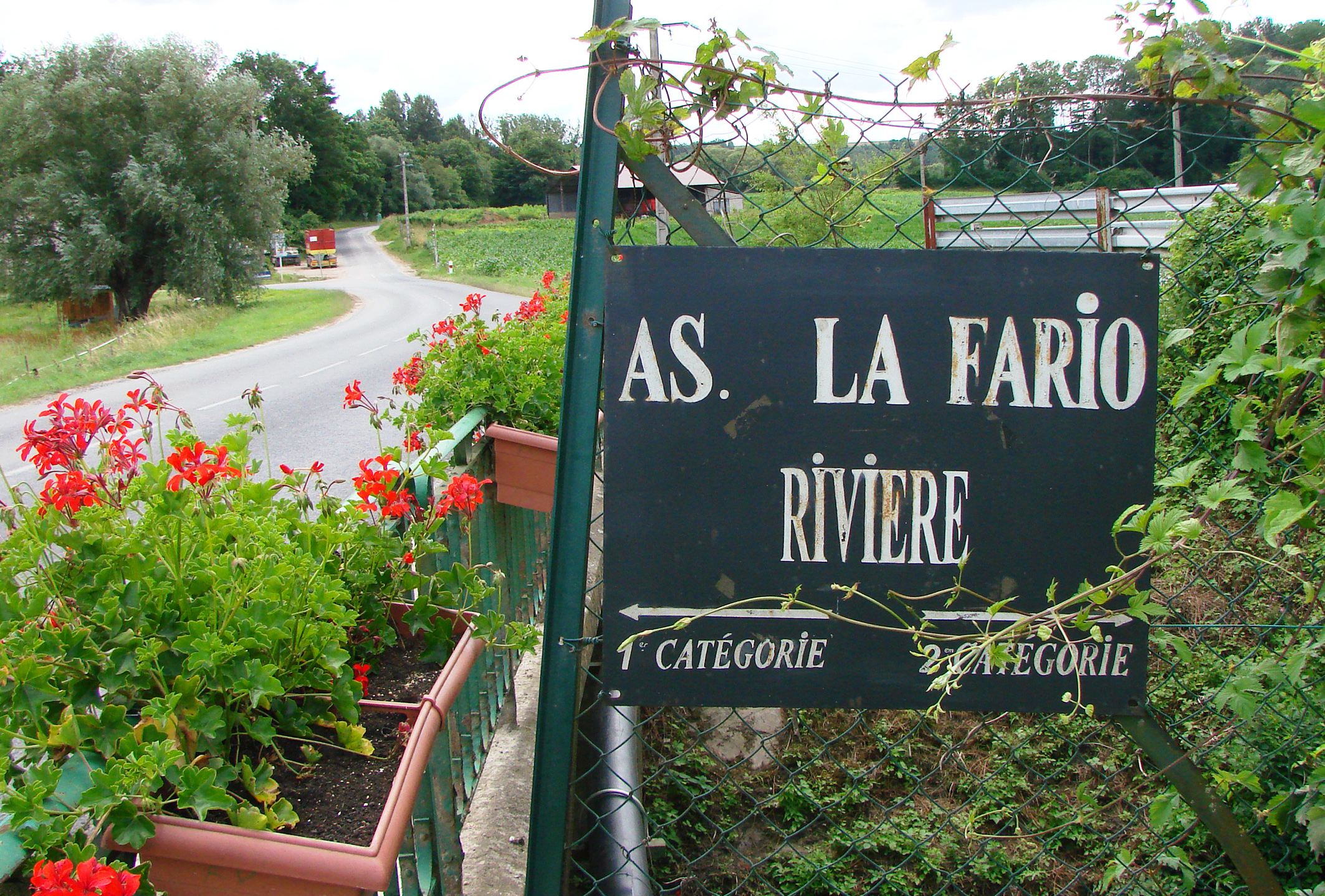 Le panneau sur le pont de l'Ardre à Faverolles-et-Coëmy (51), indiquant le changement de catégorie de la rivière pour la pêche.